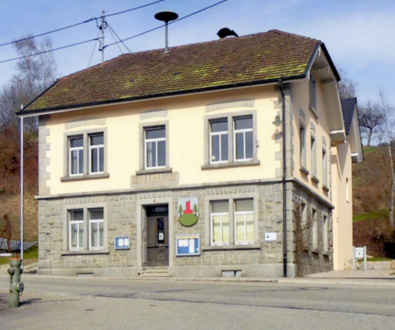 Rathaus der Gemeinde Malsburg-Marzell